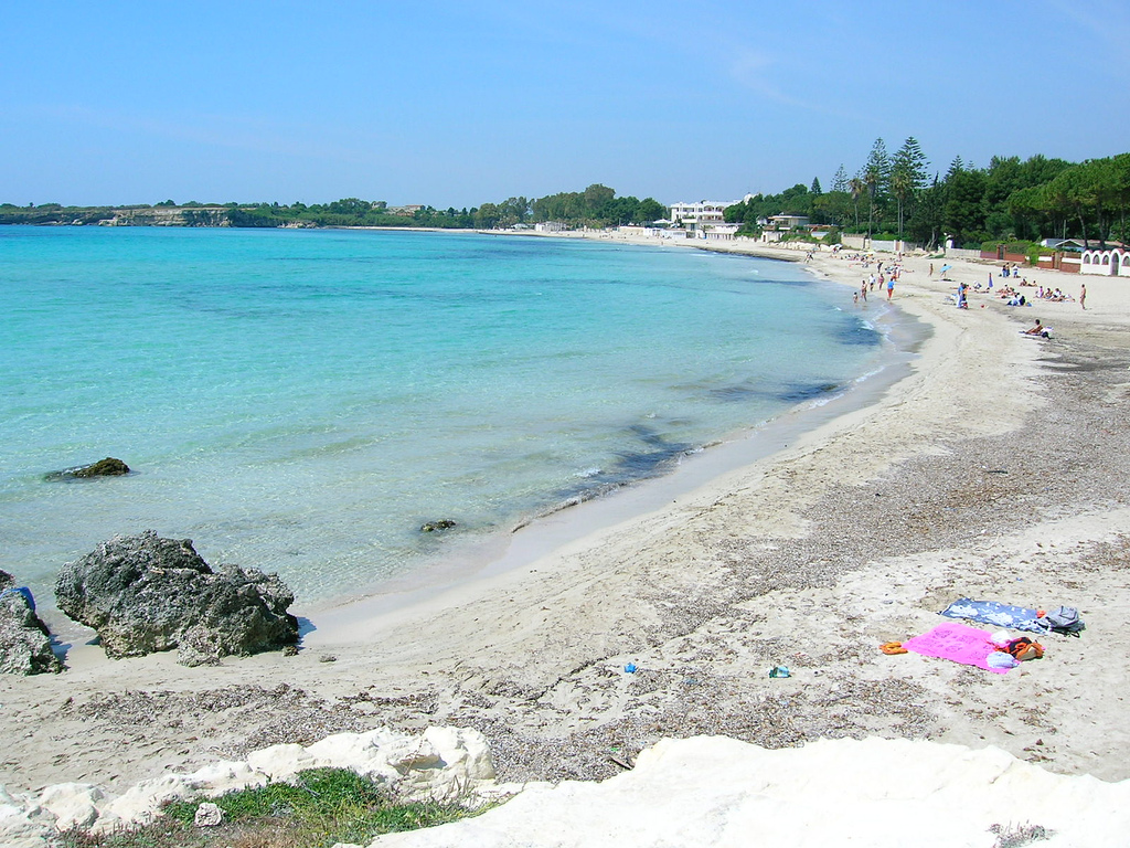 siracusa_fontane bianche